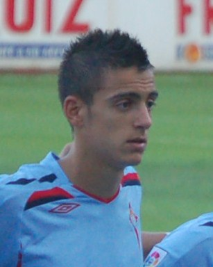 José Luis Sanmartín Mato, no 2009 xogando co RC Celta de Vigo o trofeo Cidade de Pontevedra.